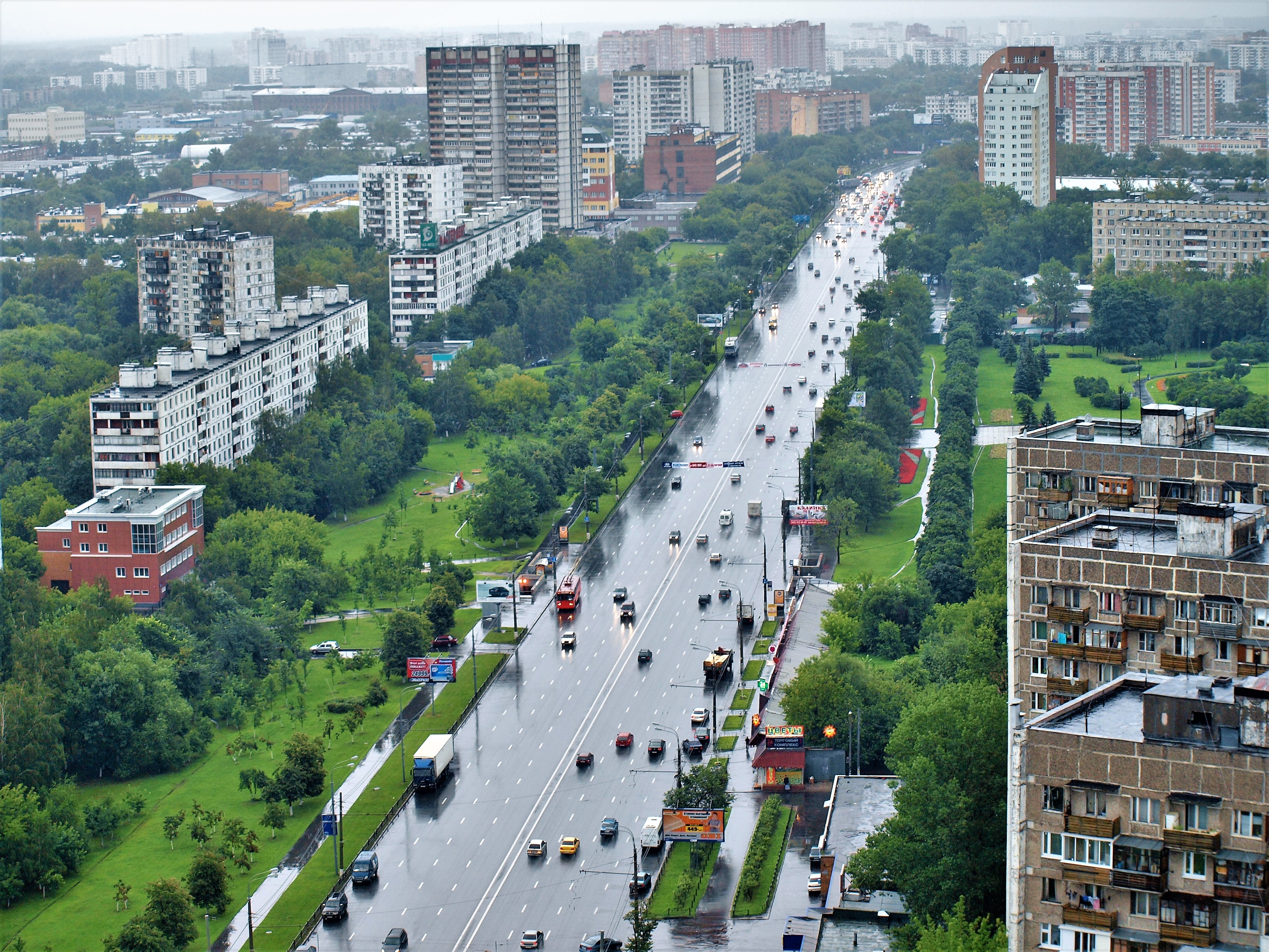 вид на Щёлковское шоссе из здания НИИ "Дельта"